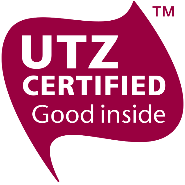 UTZ-Certified Logo